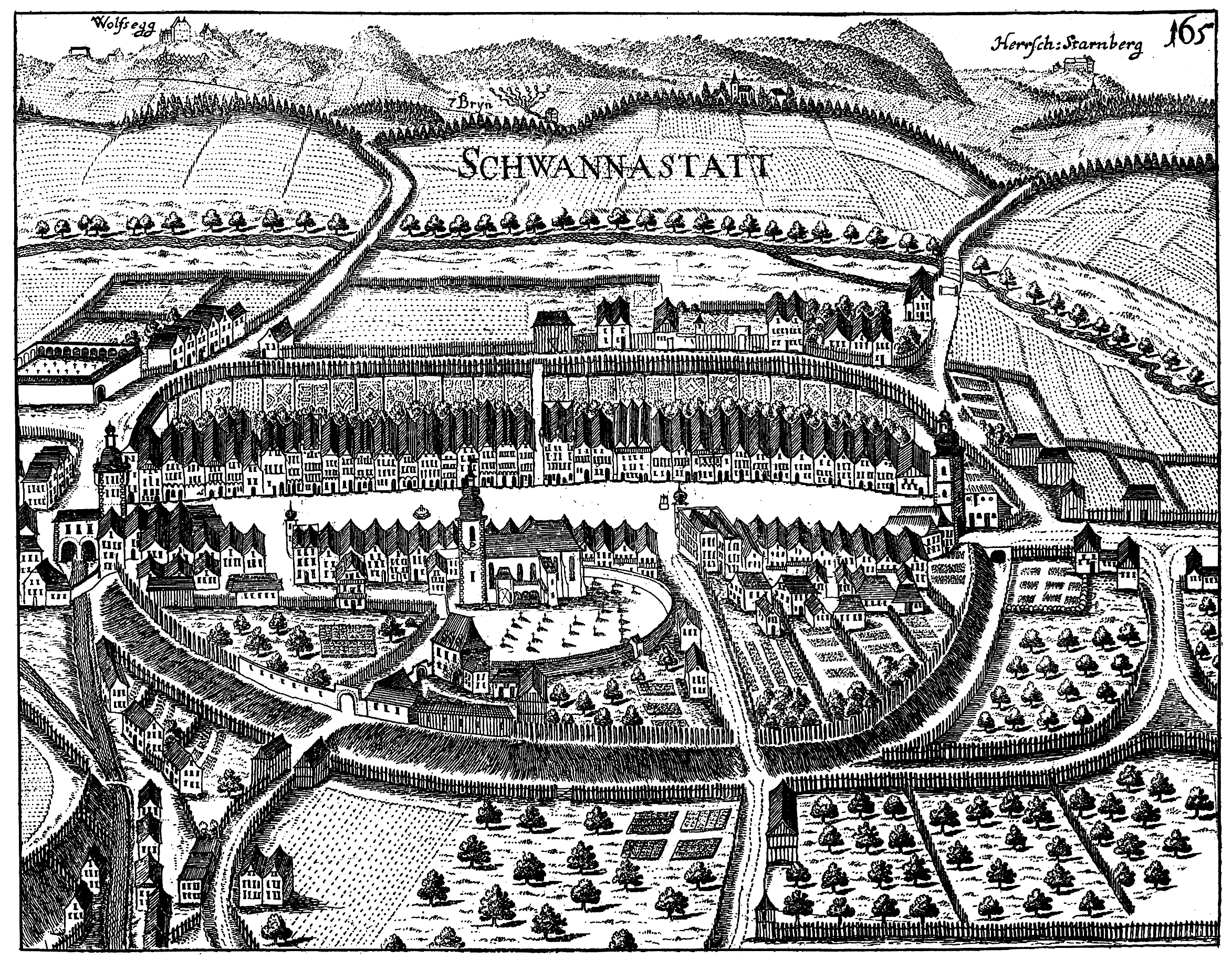 Ansicht von Schwanenstadt. Kupferstich aus Georg Matthäus Vischers Topographia Austriae superioris modernae (erschienen 1674)